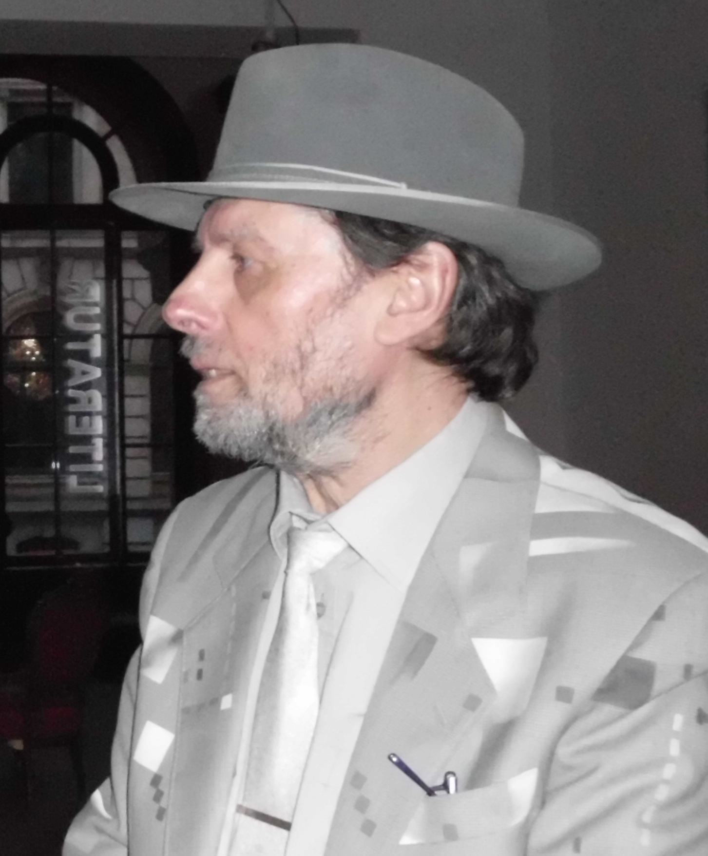 Robert Titze bei der Vernissage seiner Einzelausstellung am 9.02.2014 im Hannoverschem Künstlerverein, Künstlerhaus Hannover